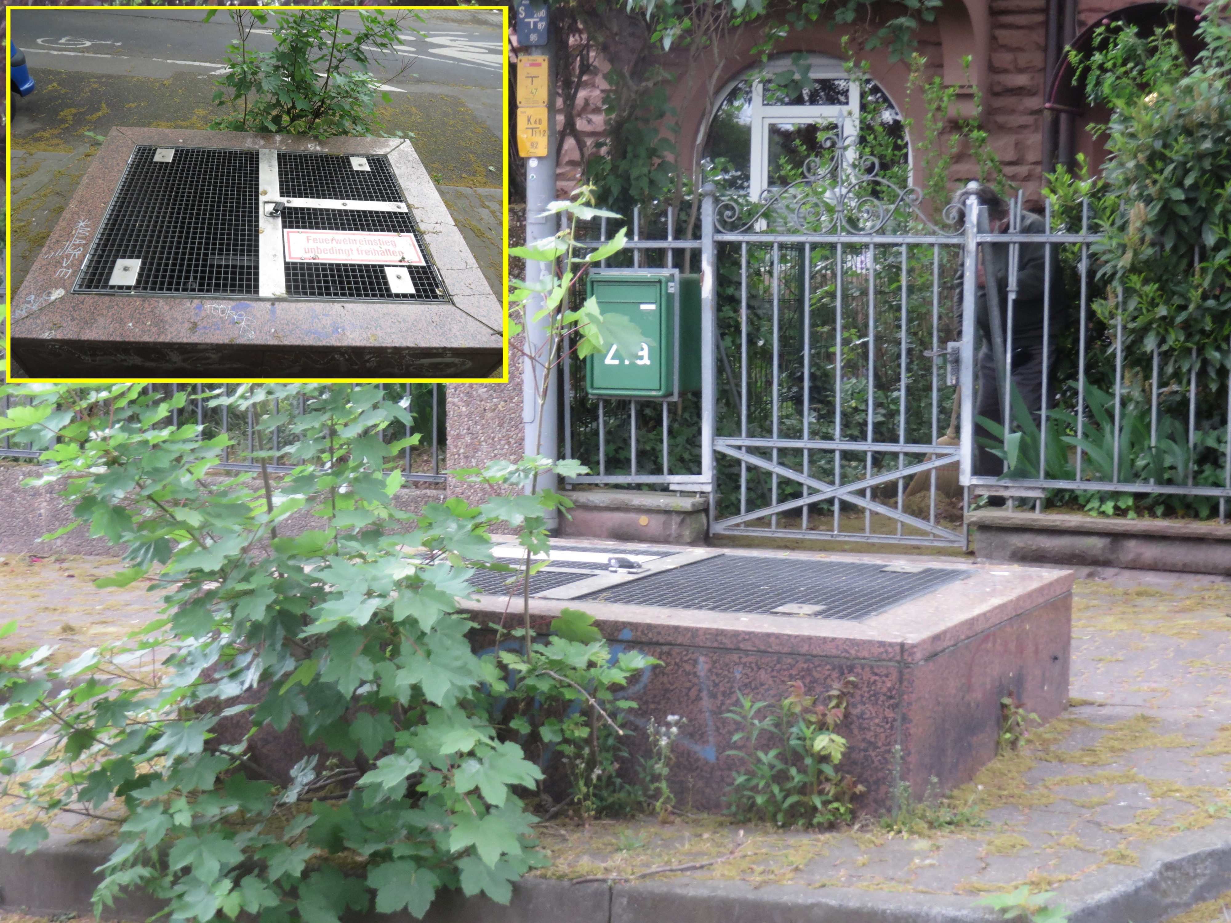 vor dem Haus Grethenweg 21a, in Frankfurt-Sachsenhausen